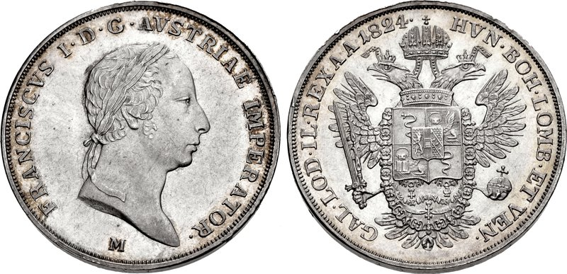 Fiorino, 3 lire austriache 1824 del Regno Lombardo-Veneto